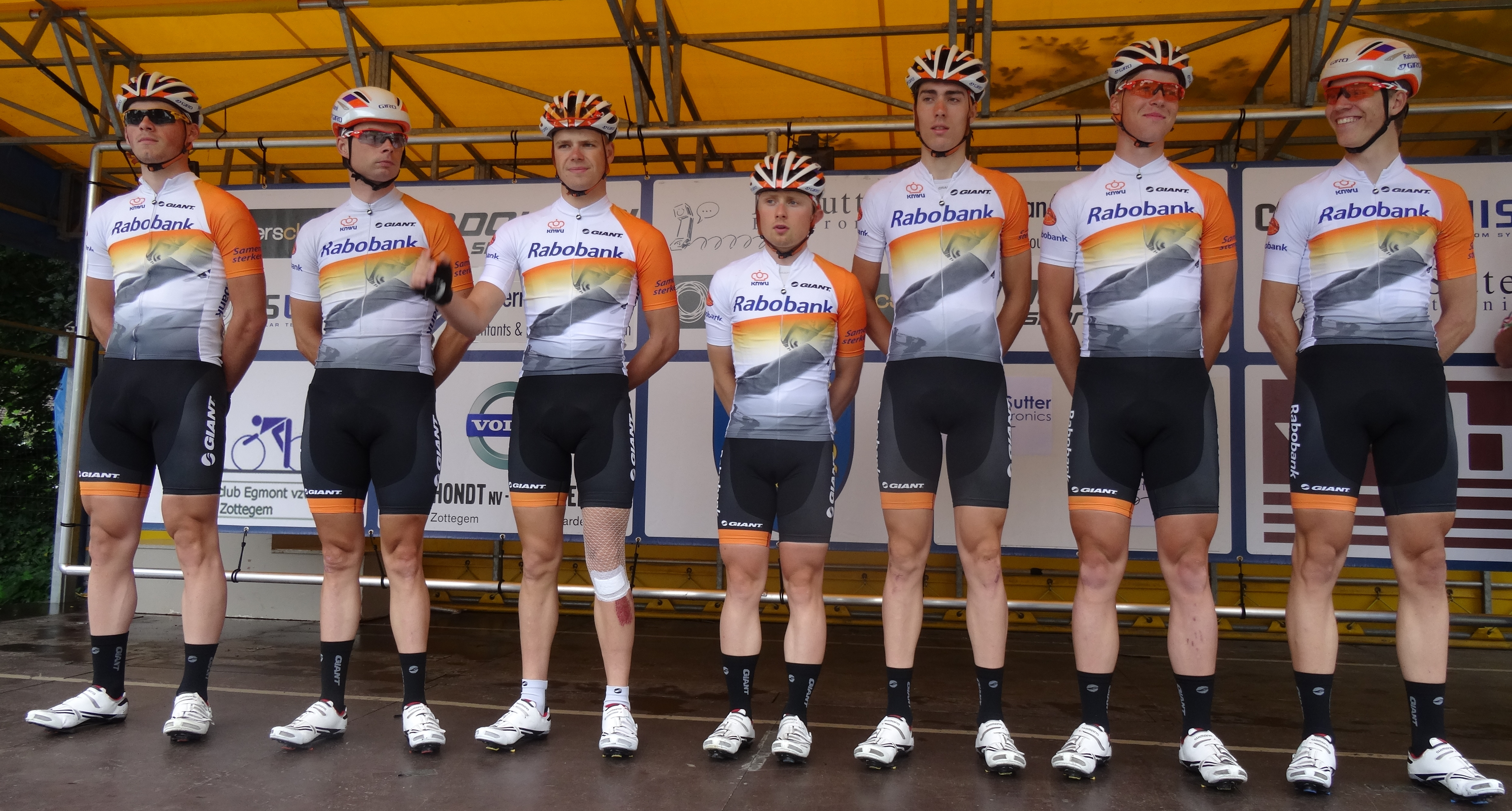 Reportage photographique réalisé le samedi 5 juillet à l'occasion du départ et de l'arrivée du Circuit Het Nieuwsblad espoirs 2014 à Grotenberge (Zottegem), Belgique.